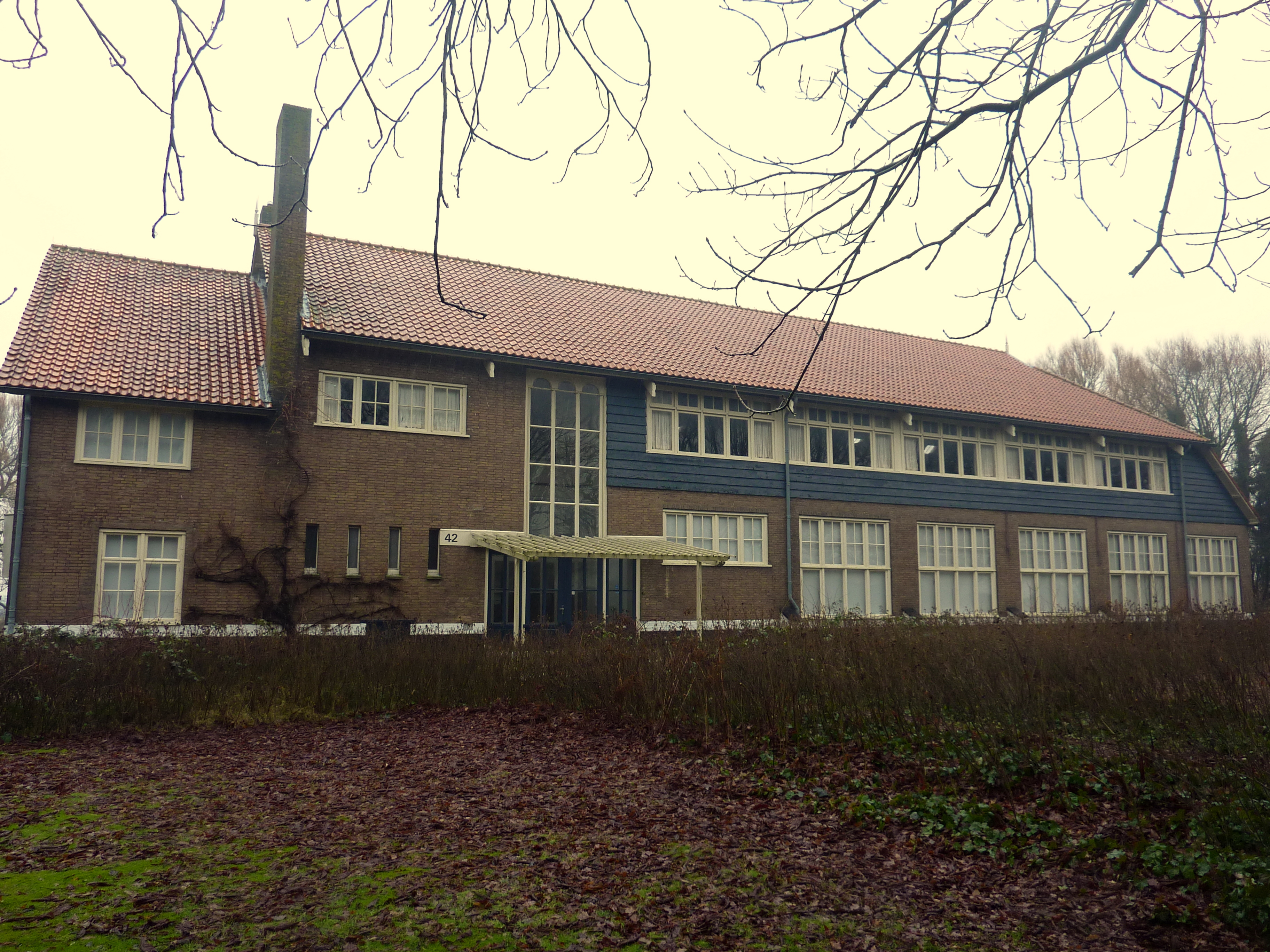 Slootdorp